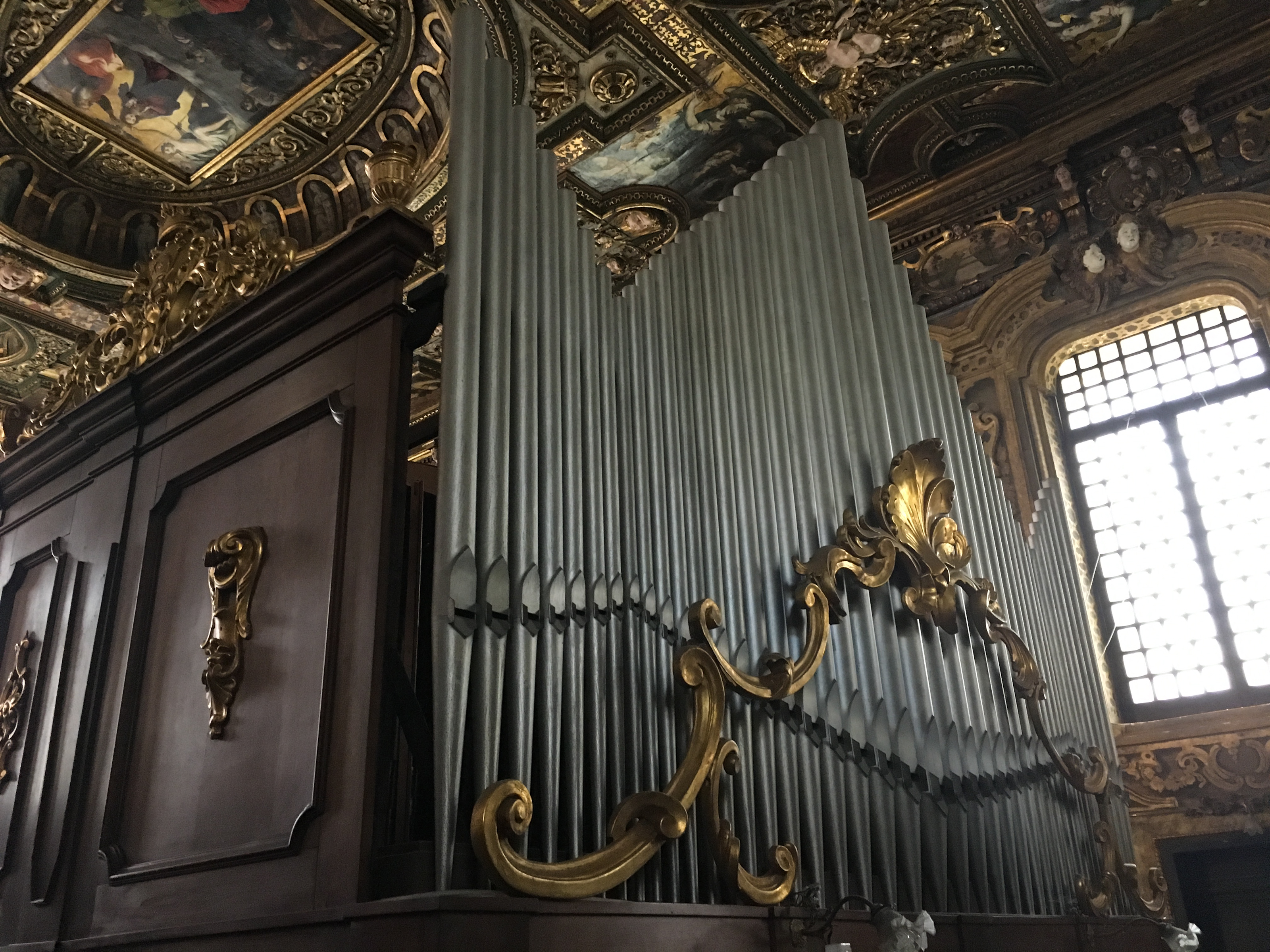 Organo, Coro delle monache - Chiostro di San Gregorio Armeno (Napoli)